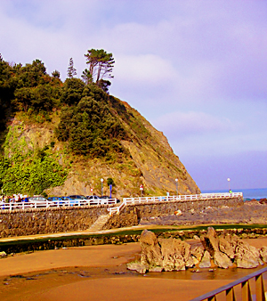 Punta de Birjilanda enBakio